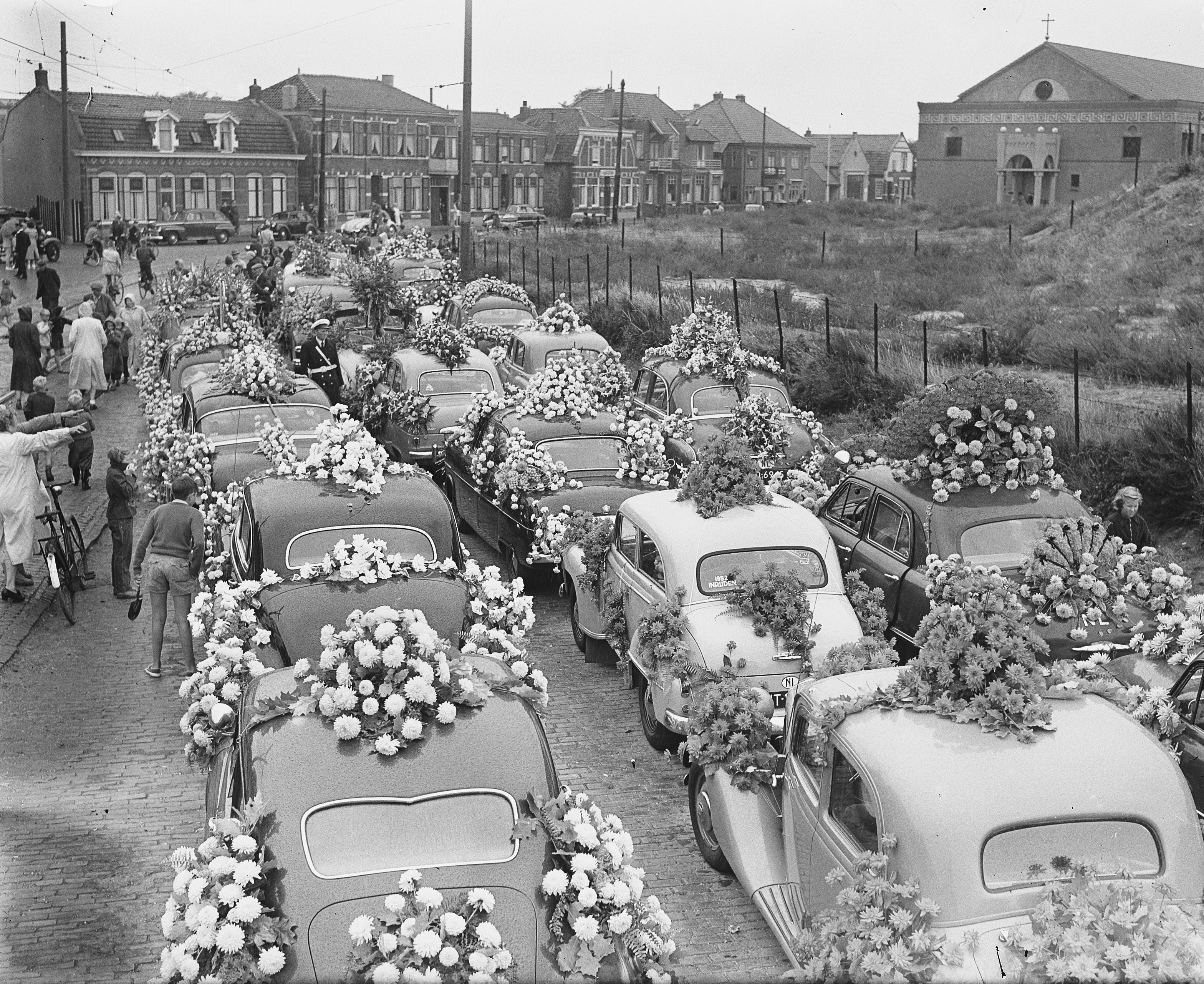 Collectie / Archief : Fotocollectie Anefo Reportage / Serie : [ onbekend ] Beschrijving : Bloemencorso Noordwijk en Rijnsburg Datum : 25 augustus 1953 Locatie : Noordwijk, Huis ter Duinstraat (einde) bij Maria Terzeekerk Trefwoorden : BLOEMENCORSO Persoonsnaam : Bloemencorso Fotograaf : Duinen, […] van / Anefo Auteursrechthebbende : Nationaal Archief Materiaalsoort : Glasnegatief Nummer archiefinventaris : bekijk toegang 2.24.01.09 Bestanddeelnummer : 905-9087